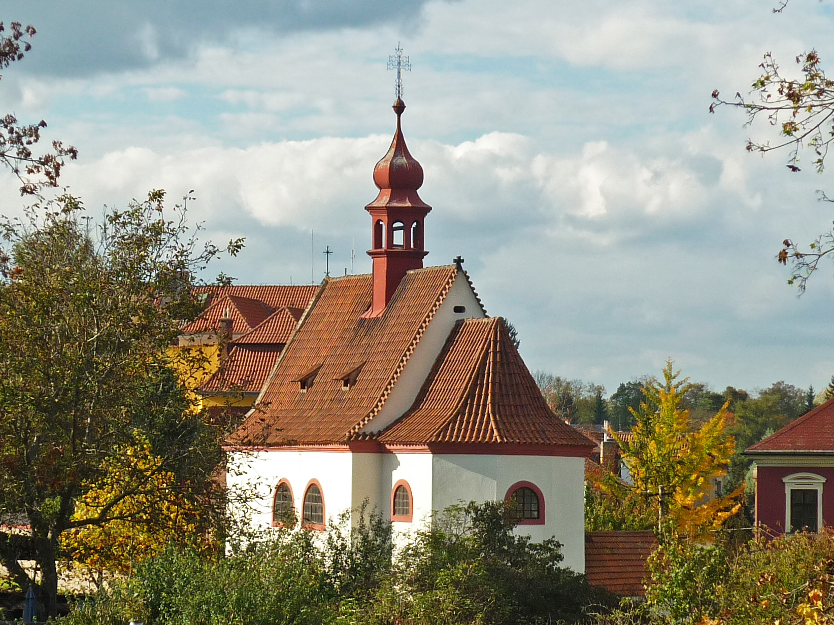 Peterskirche in Brandeis an der Elbe (Brandýs nad Labem)